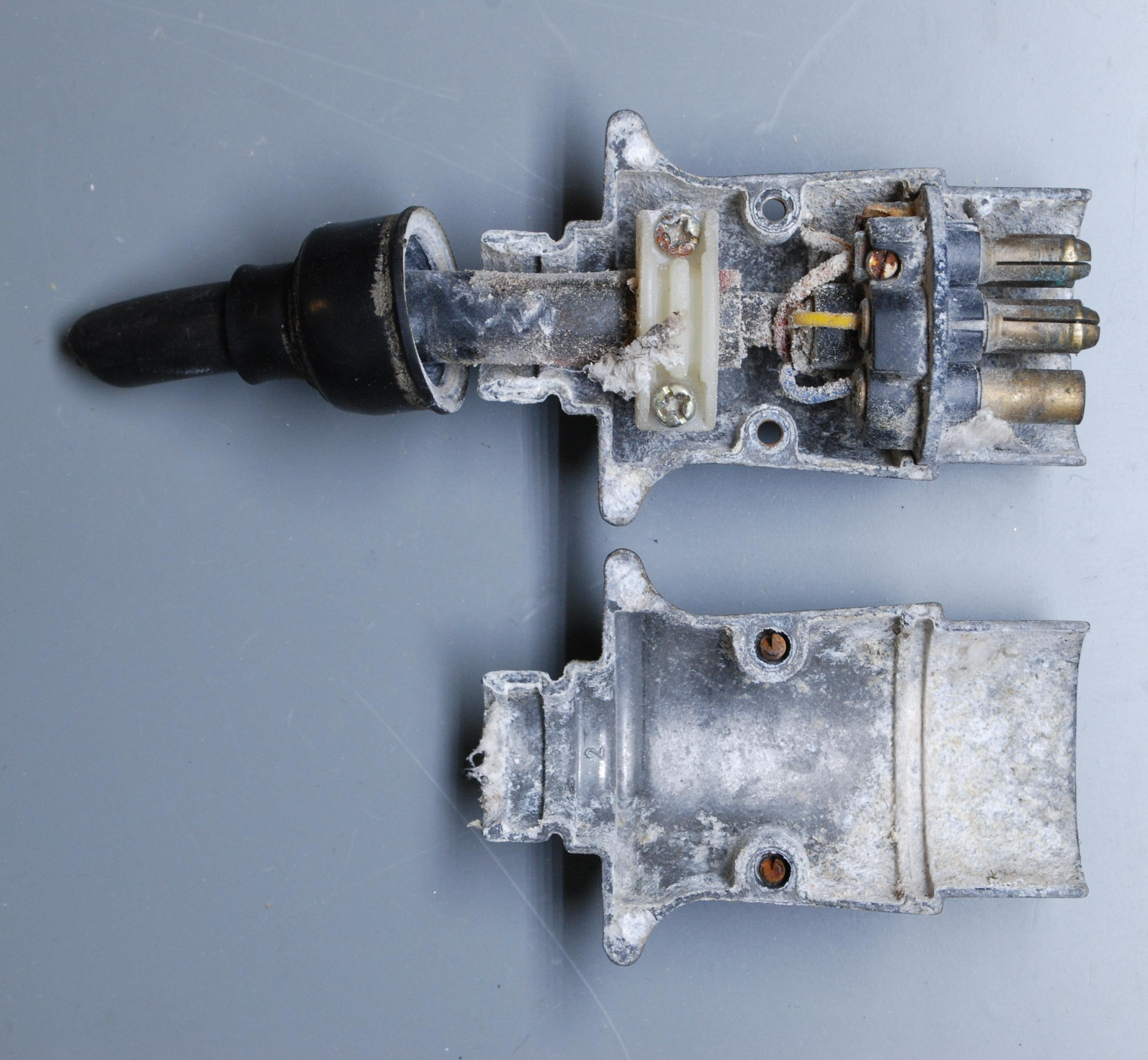 Ein durch Zinkpest und Korrosion unbrauchbar gewordener Anhängerstecker der ISO 1724 Norm.